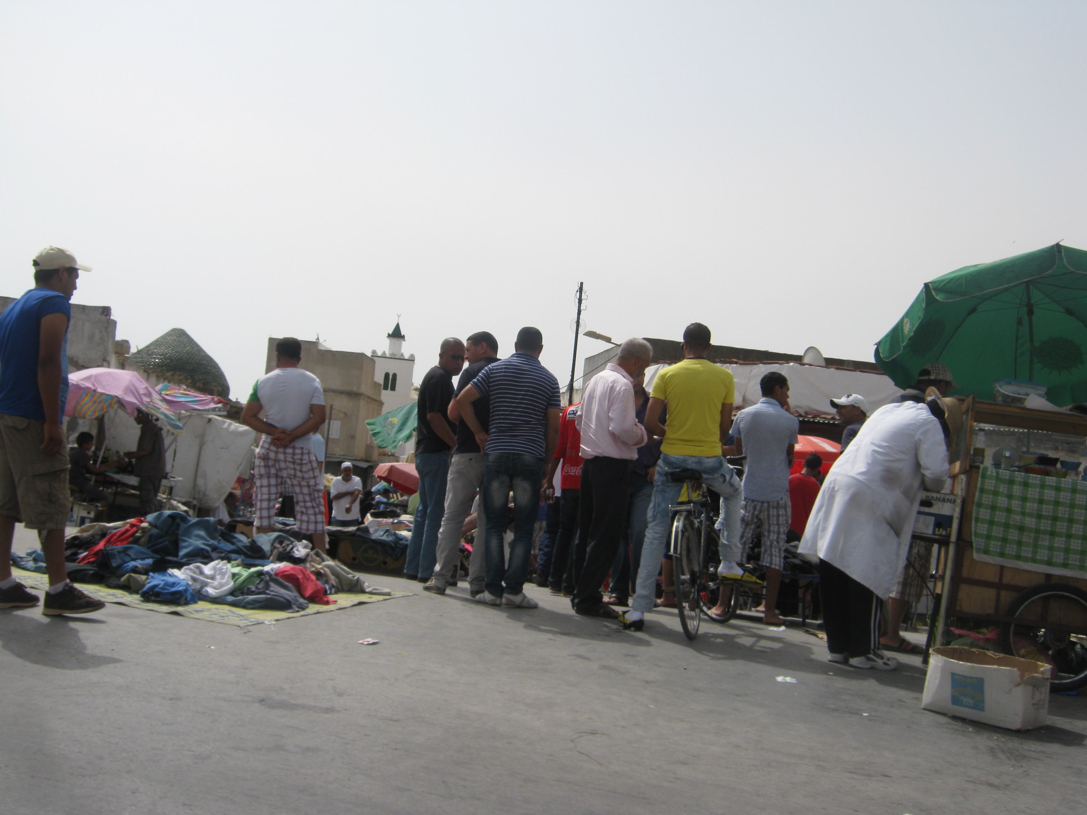 Souk sidi abdesselem